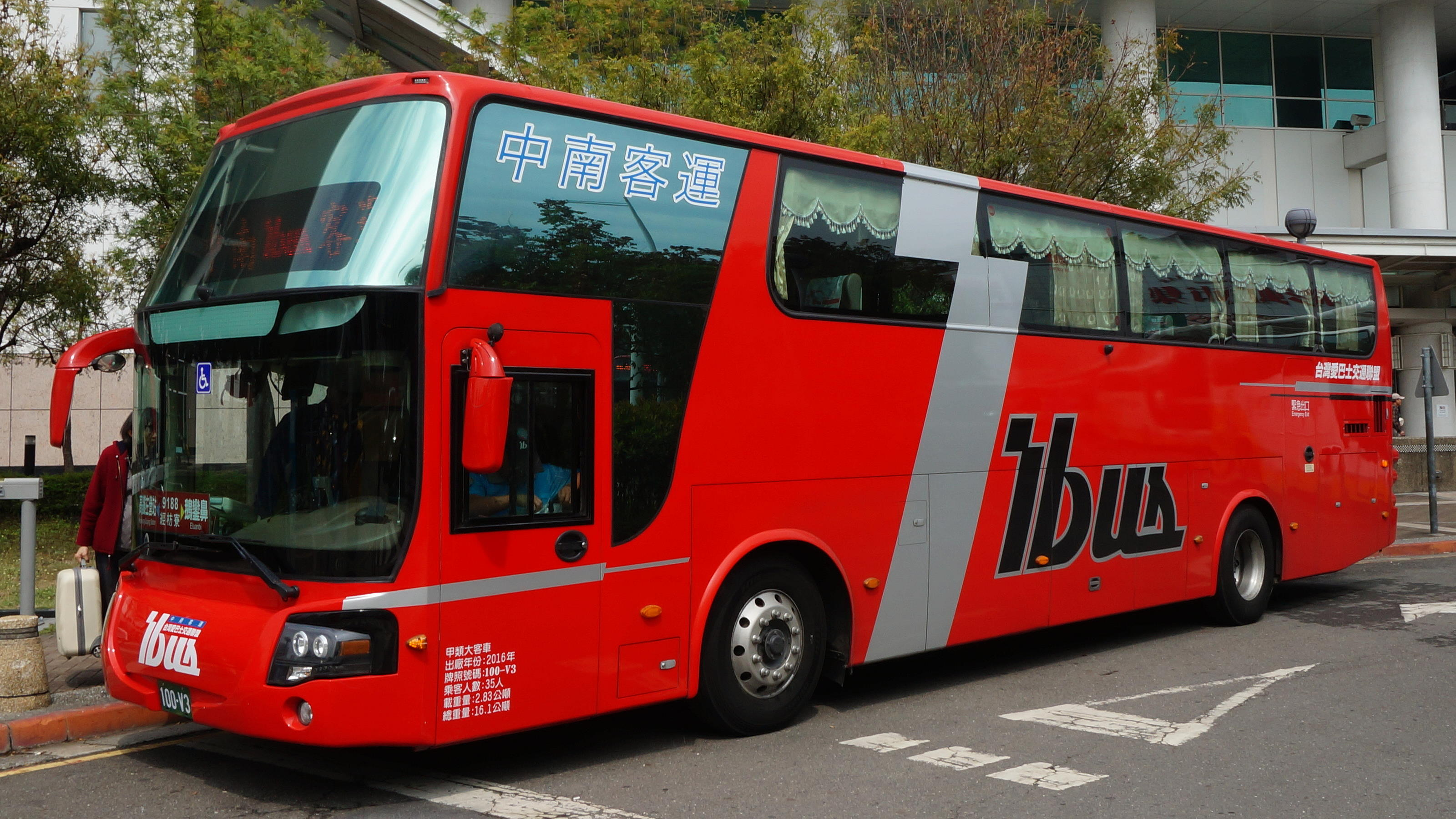 中南客運2016年大客車100-V3。